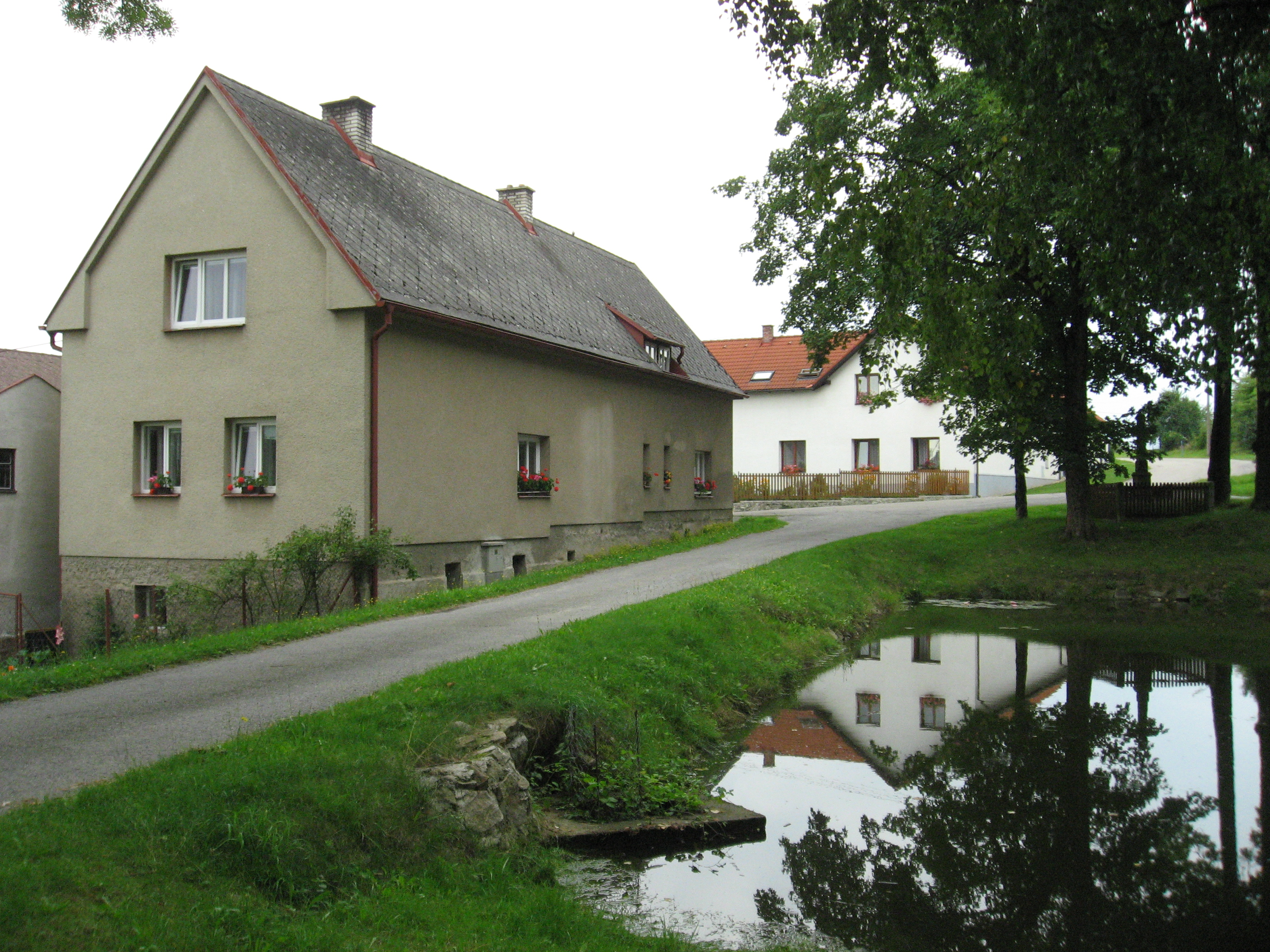 Michalovice, okres Havlíčkův Brod